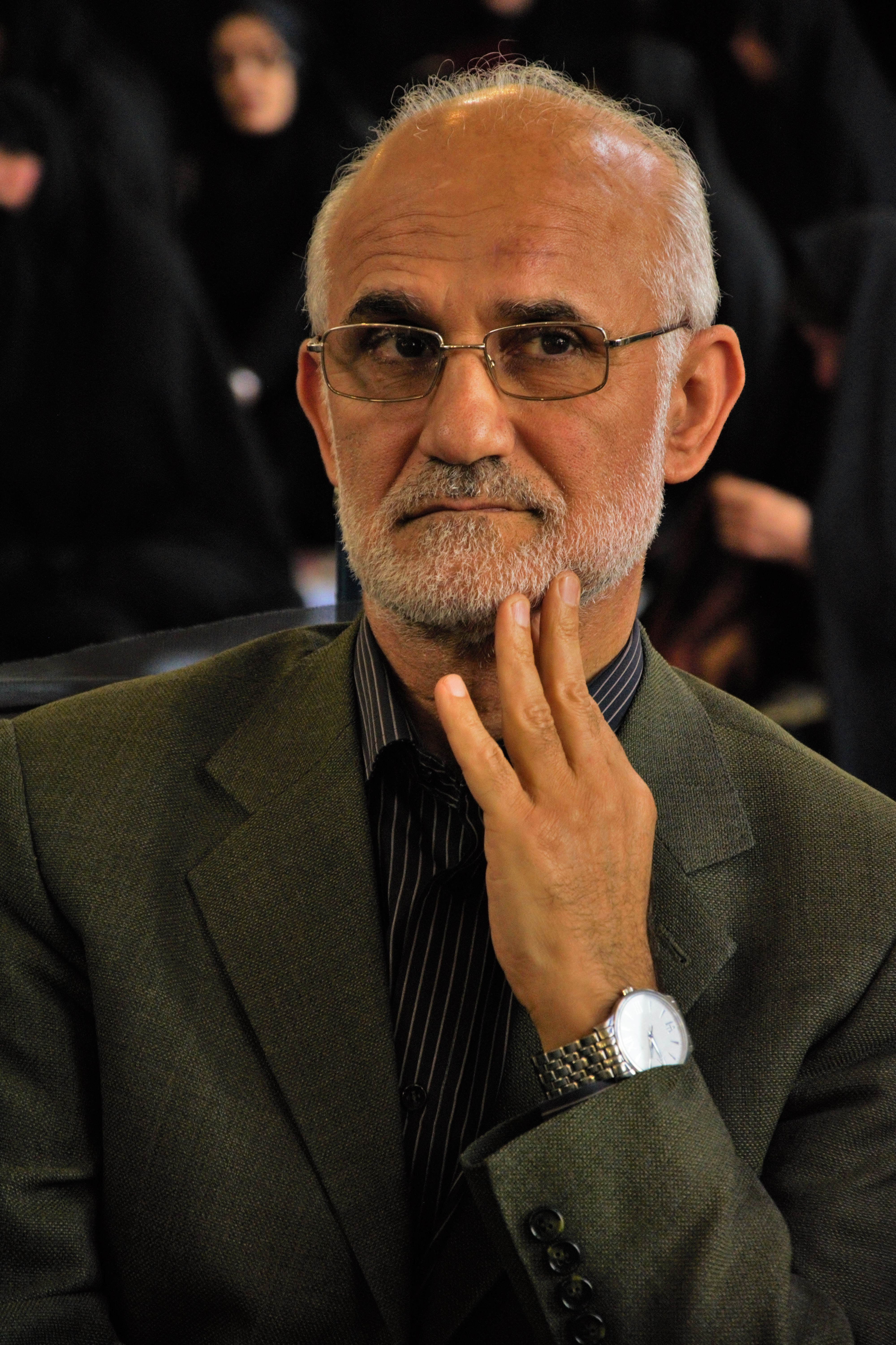 مصطفی معین در هفتمین سالگرد درگذشت آیت الله منتظری مسجد بازار-نجف آباد